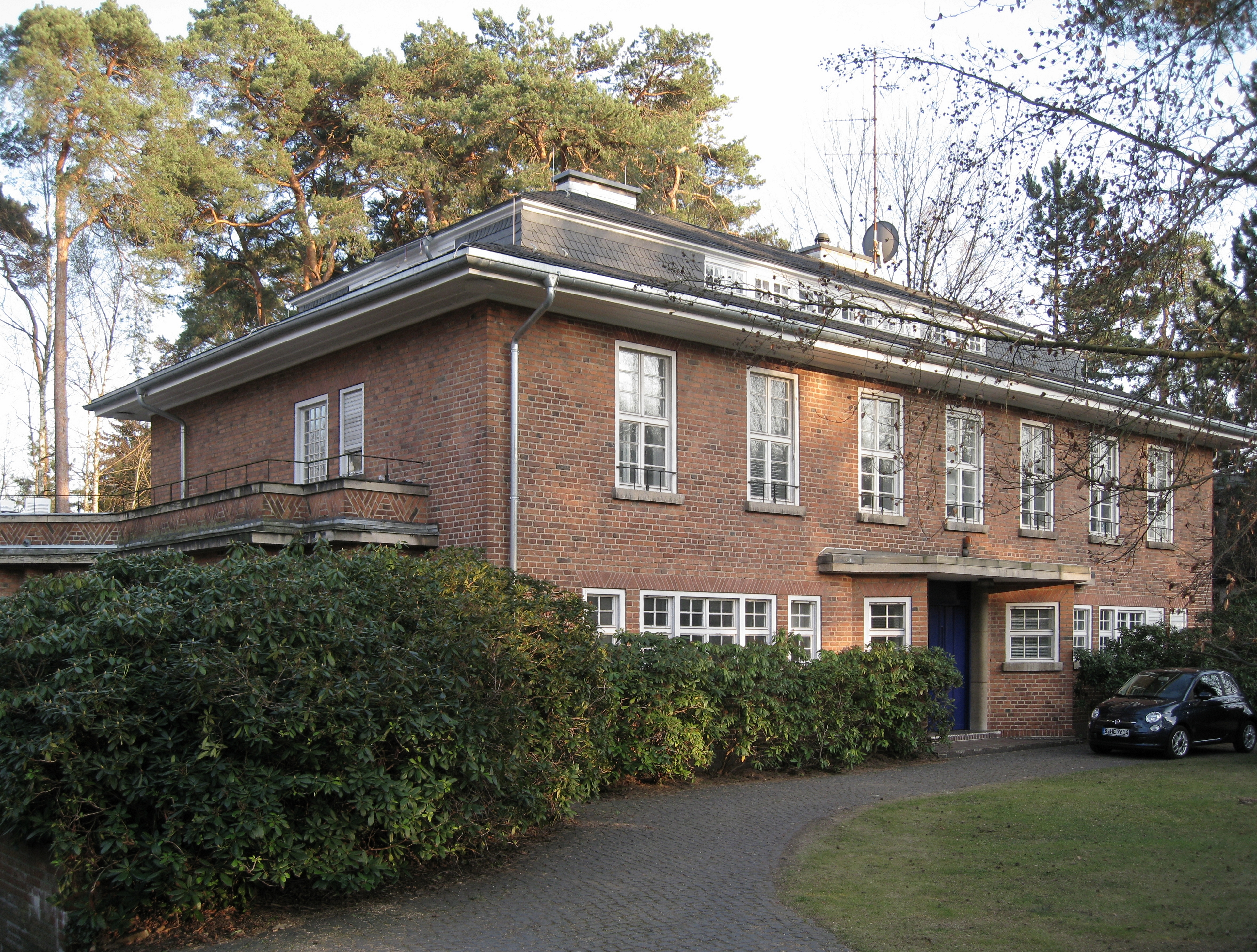 Landhaus mit Einfriedung